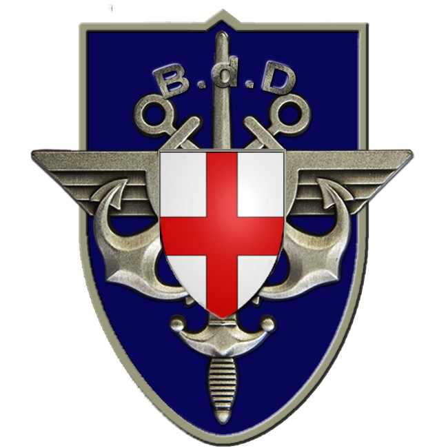 Insigne EMA avec blason de la ville de Calvi en son centre.